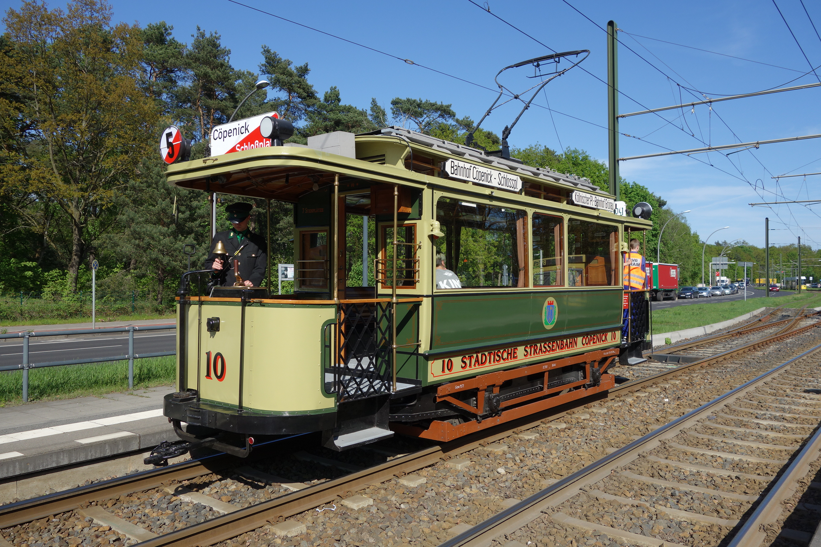 Triebwagen 10 der Städtischen Straßenbahn Cöpenick